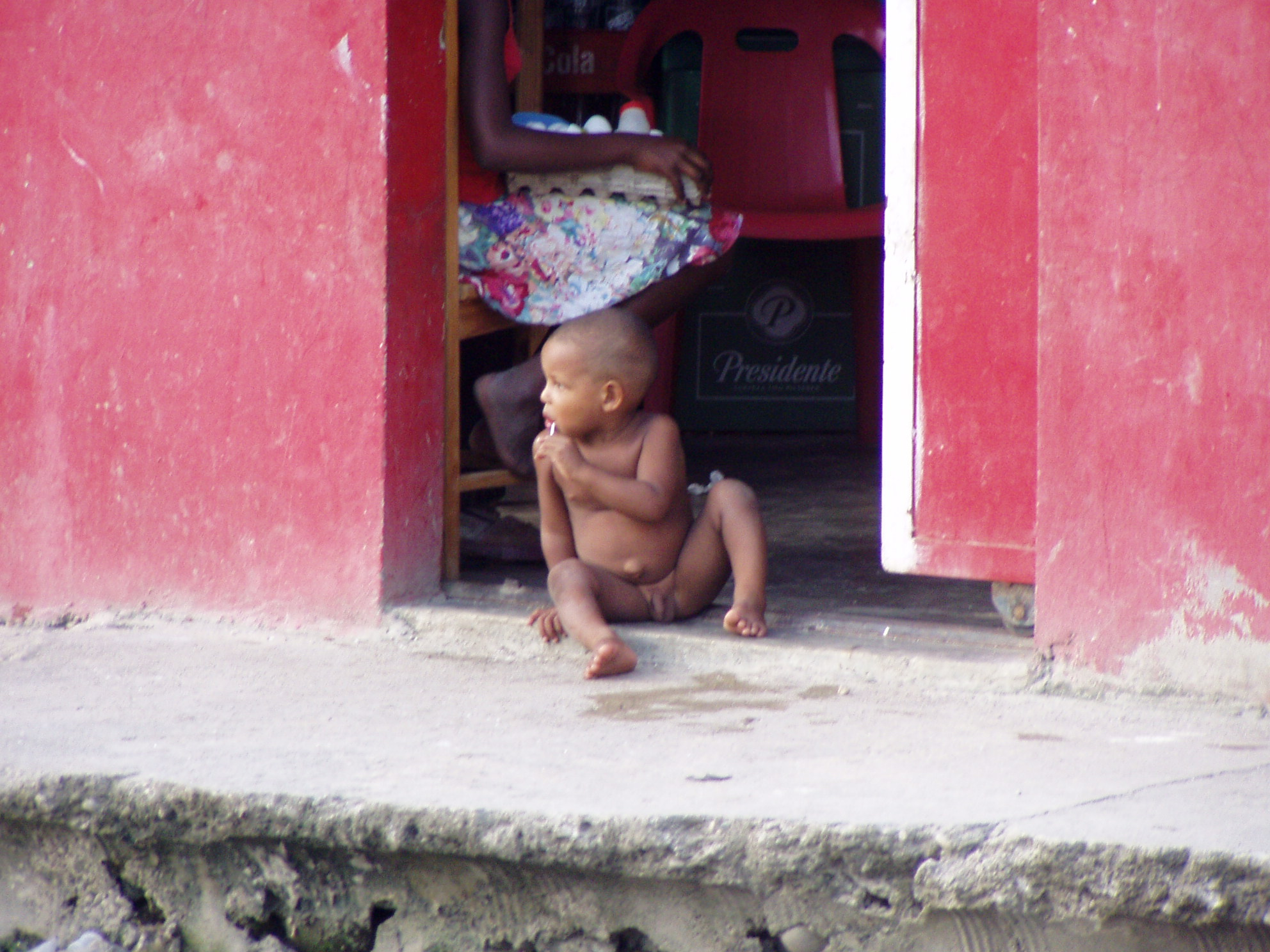 Missione genovese del Guaricano - Santo Domingo (Dominican Republic) - Foto di Donpaolo